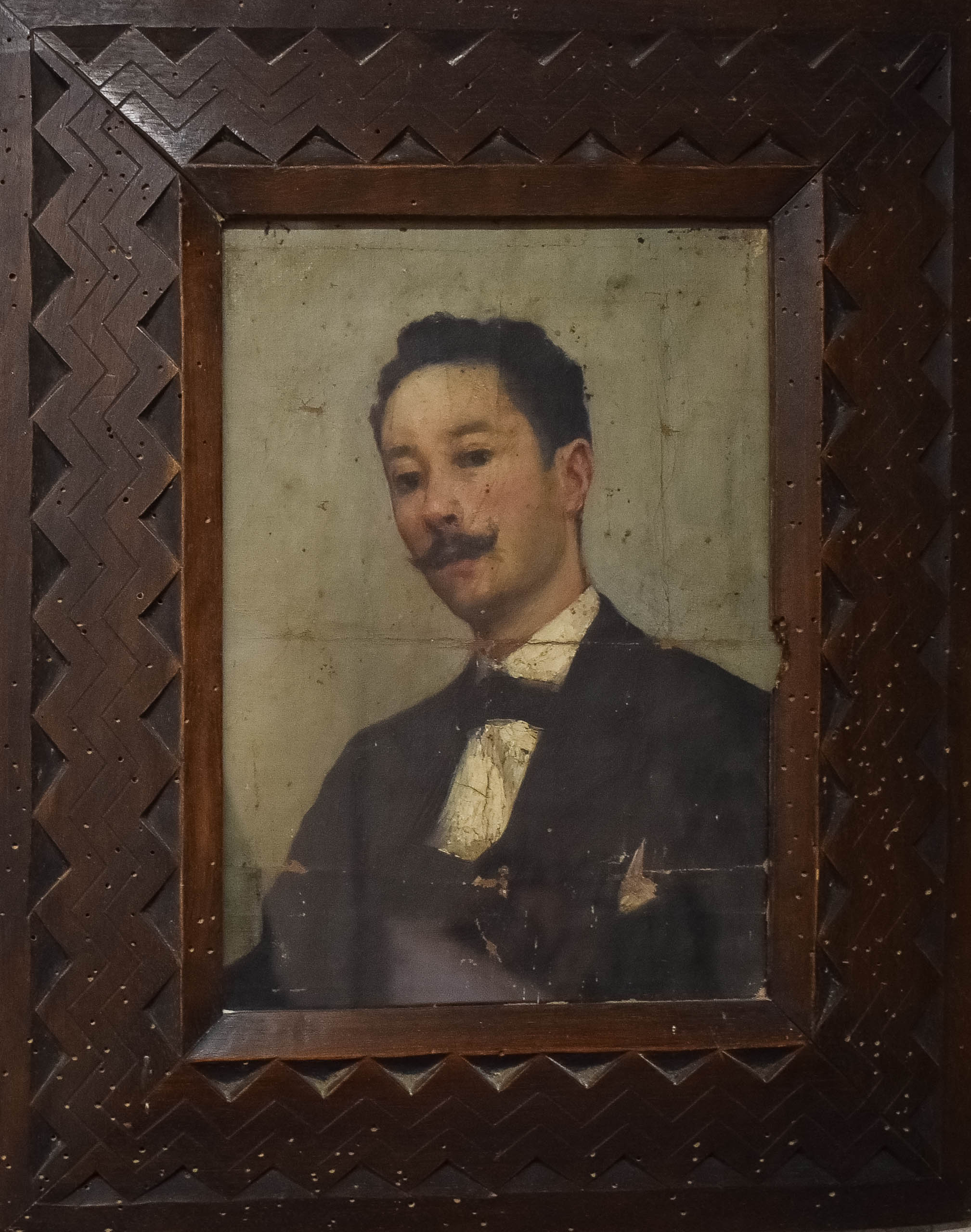 Ambito emiliano (?), Ritratto di Giuseppe Zacchini, (1890 - 1910), olio su tela, cm 27.5 x 33.5, Museo delle Storie di Pieve, Pieve di Cento (Bologna) This is a photo of a monument which is part of cultural heritage of Italy.